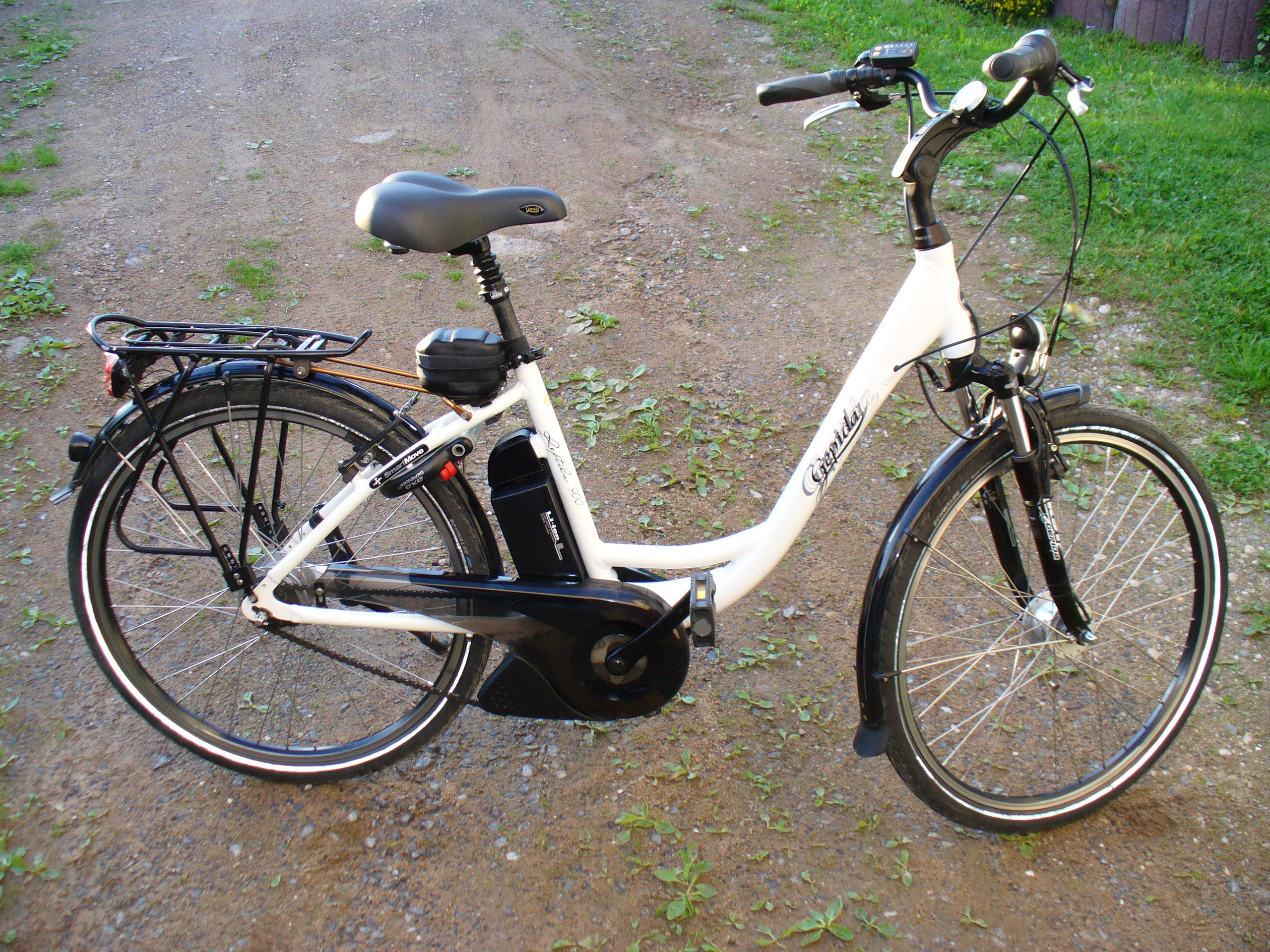 Gepida (Ungarn) Pedelec, Damenversion, Modell Reptila mit Yamaha Mittelmotor und Lion-Akku, 8-Gang-Shimano-Nabenschaltung, Shimano Nabendynamo im Vorderrad, Axa-Defender Rahmenschloss mit zusätzlicher Einsteckkette (in Satteltasche), Bj. etwa 2010